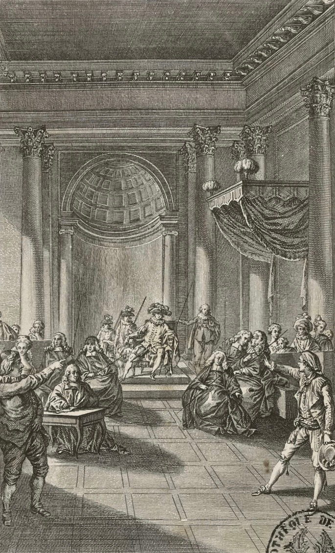 Claude-Nicolas Malapeau (1755-1803) nach Jacques-Philippe-Joseph de Saint-Quentin (* 1738): Illustration zum 3. Akt in der Erstausgabe von "Le mariage de Figaro" von Pierre-Augustin Caron de Beaumarchais (1732–1799), Ruault, Paris 1785. Bibliothèque nationale de France.